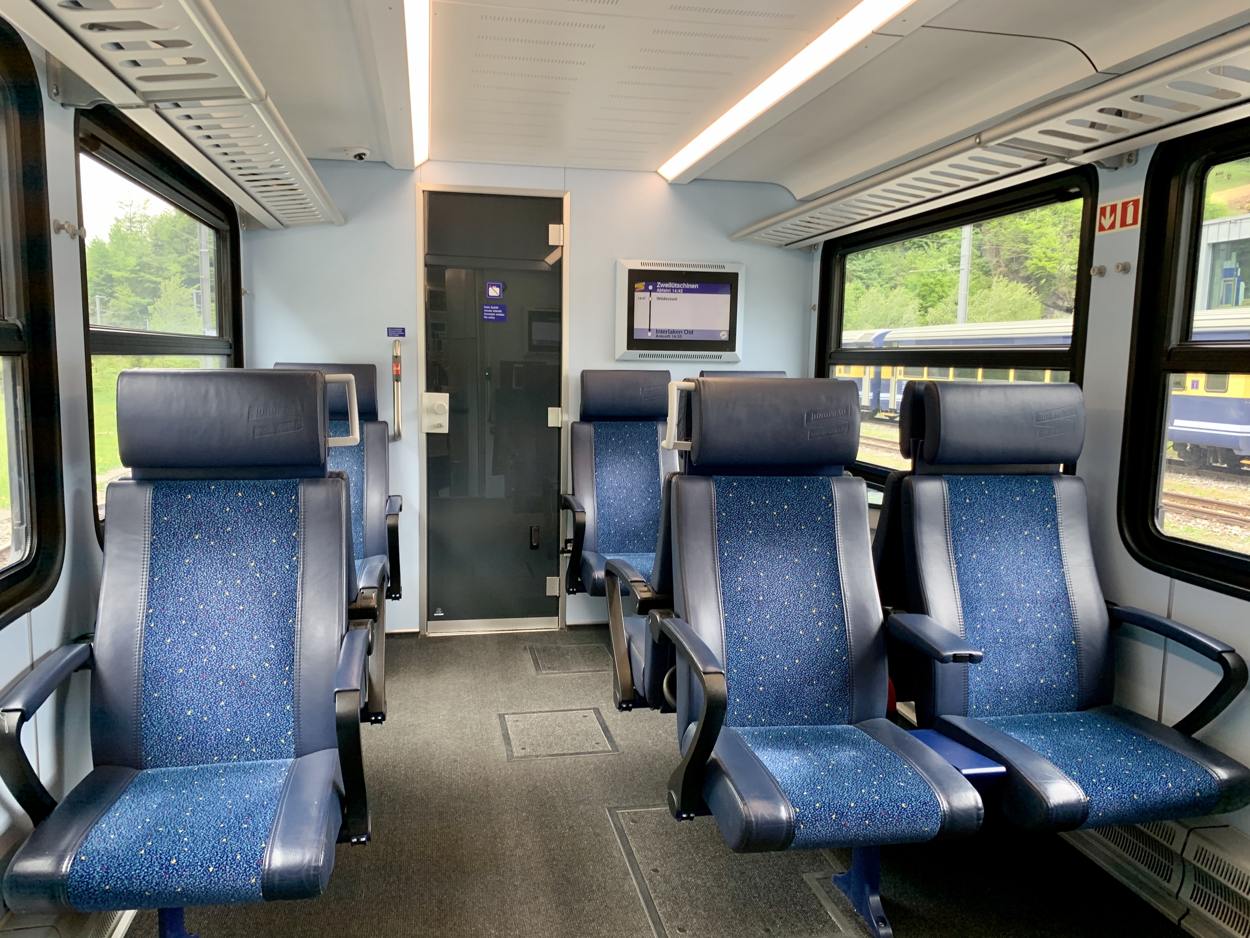 Ein Blick in die 1. Klasse in einem ABDeh 8/8